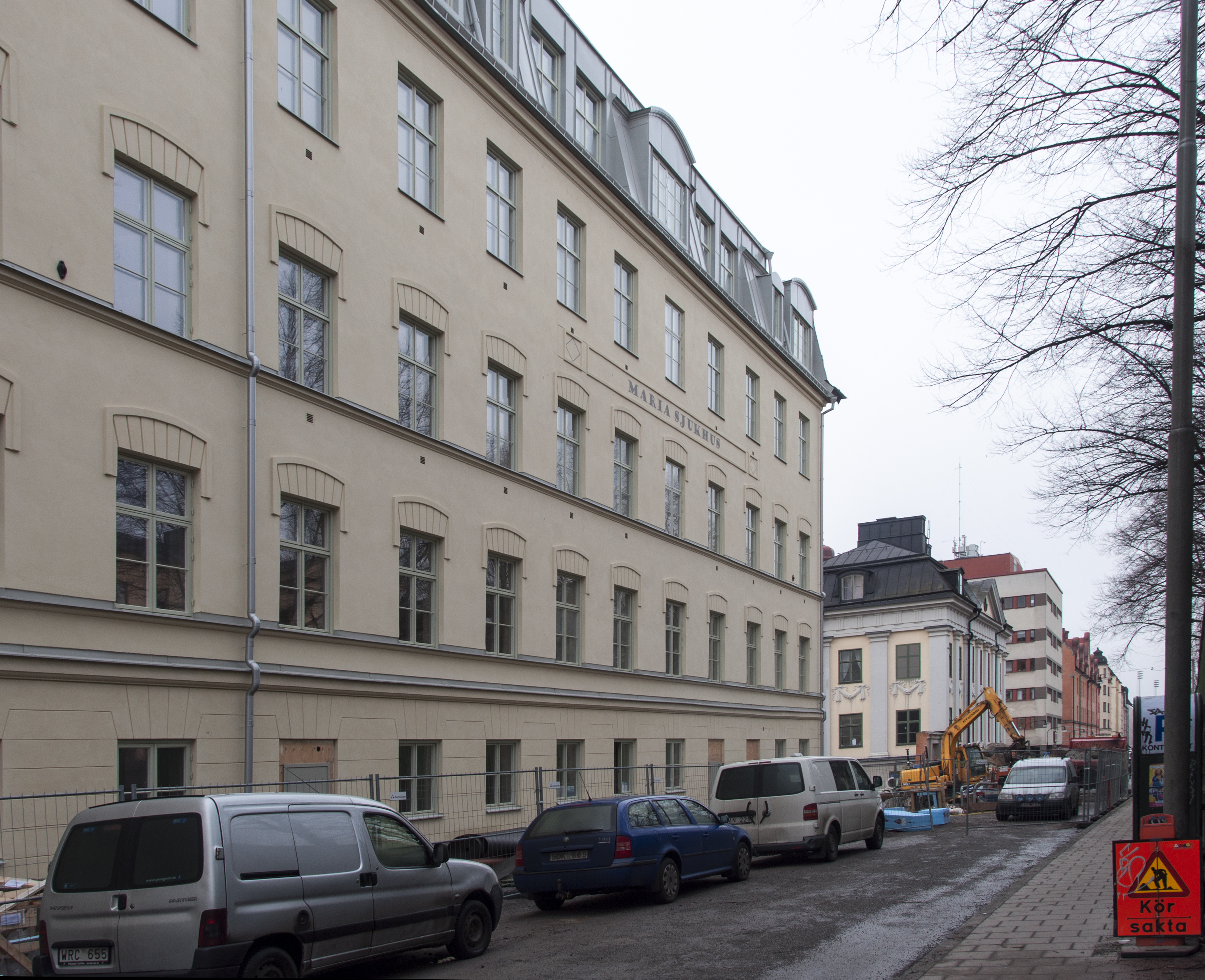 Maria Sjukhus, Wollmar Yxkullsgatan 19-21. Byggnaden tillhörde det Reenstiernska palatset och användes som fabrik 1874, då det köptes av Stockholms stad och gjordes om till sjukhus. 1884 ombyggnad till nuvarande höjd, arkitekt G Wickman. I bakgrunden syns Reenstiernska palatset